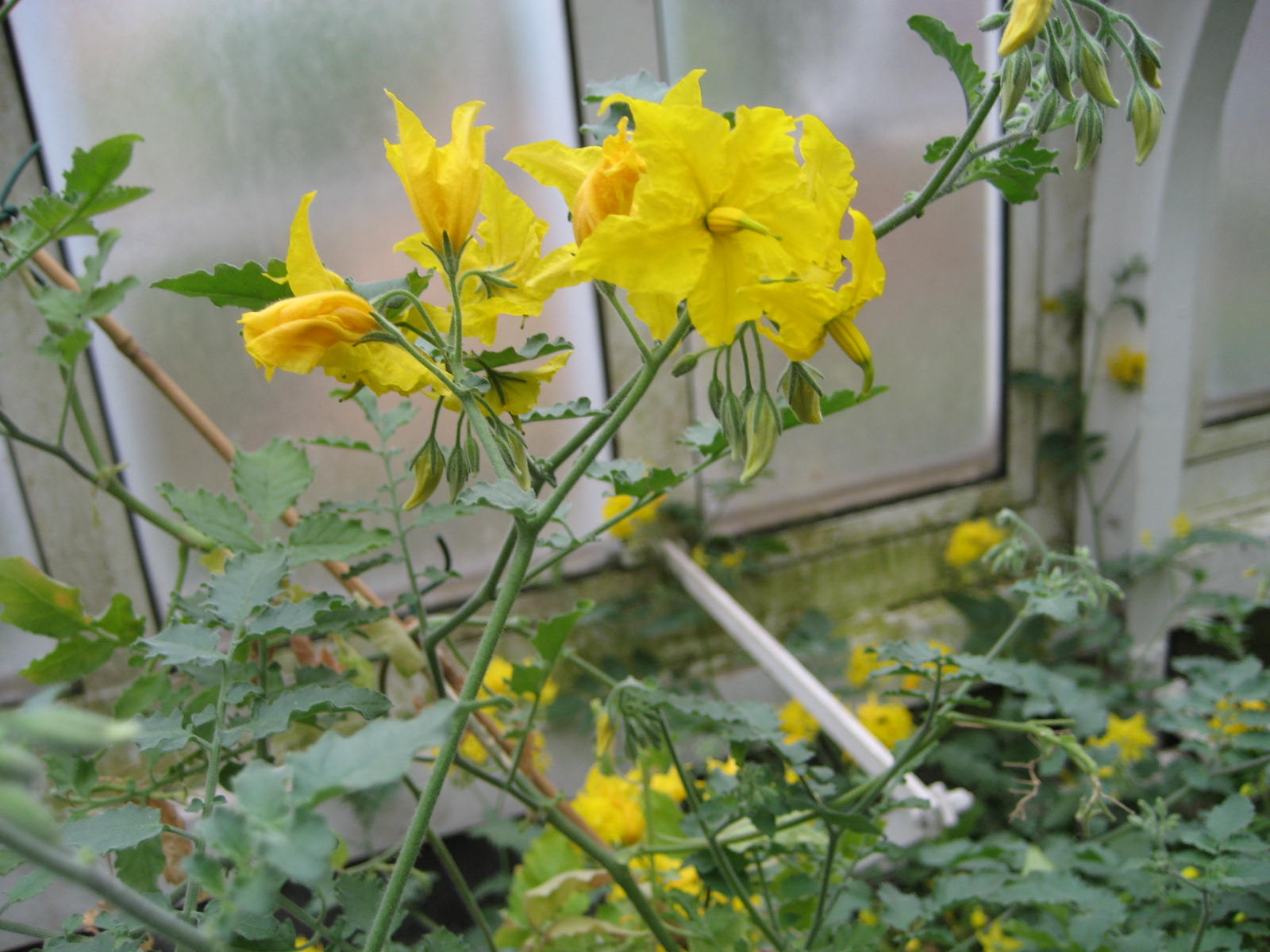 Solanum chilense - Blüte - Bot. Garten Berlin Dahlem